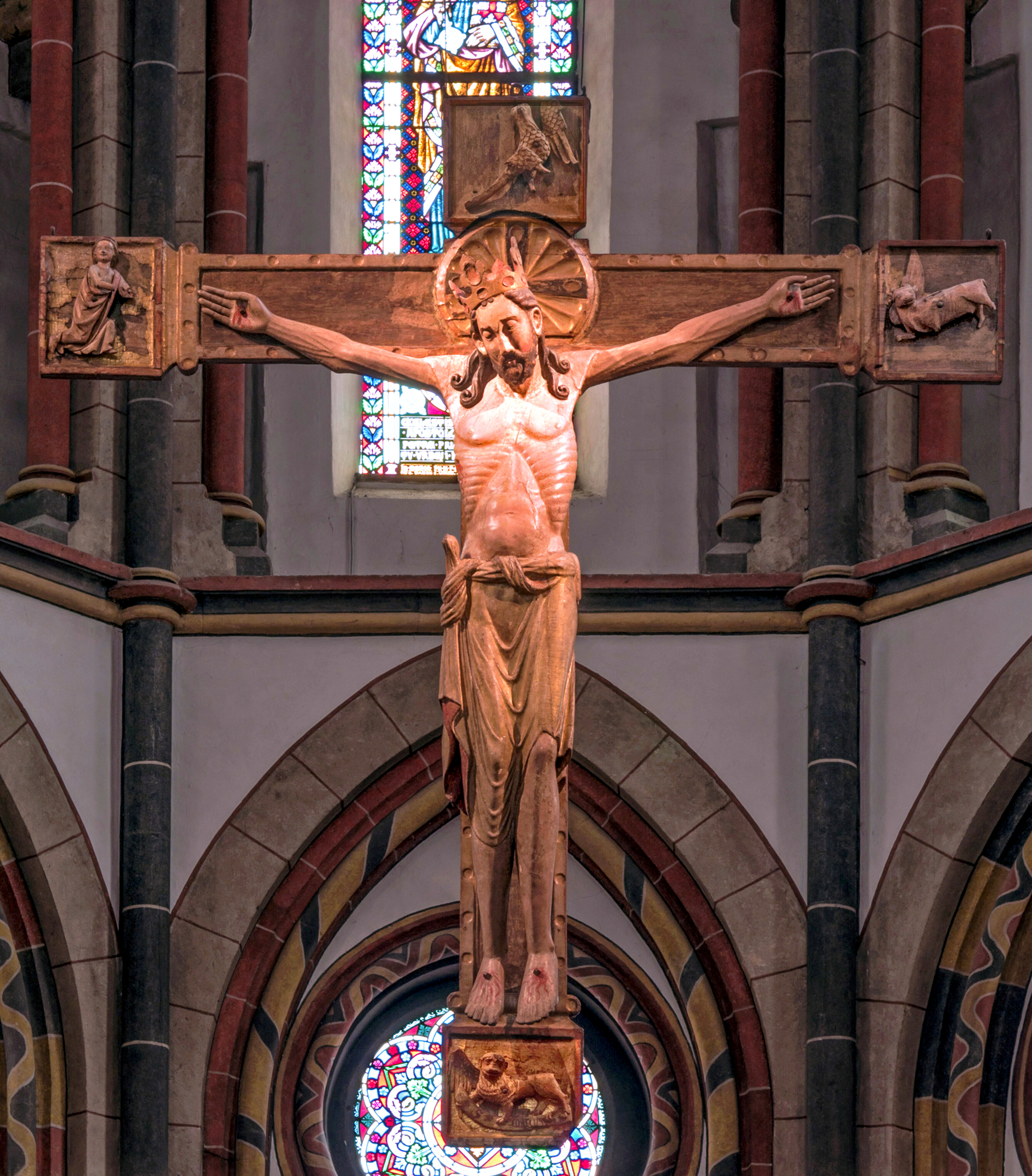 Triumphkreuz in der Bopparder St. Severus Kirche ist eines der bedeutendsten Zeugnisse staufischer Kunst am Mittelrhein. Die Evangelistensymbole an den Kreuzenden wurden um 1300 ergänzt.